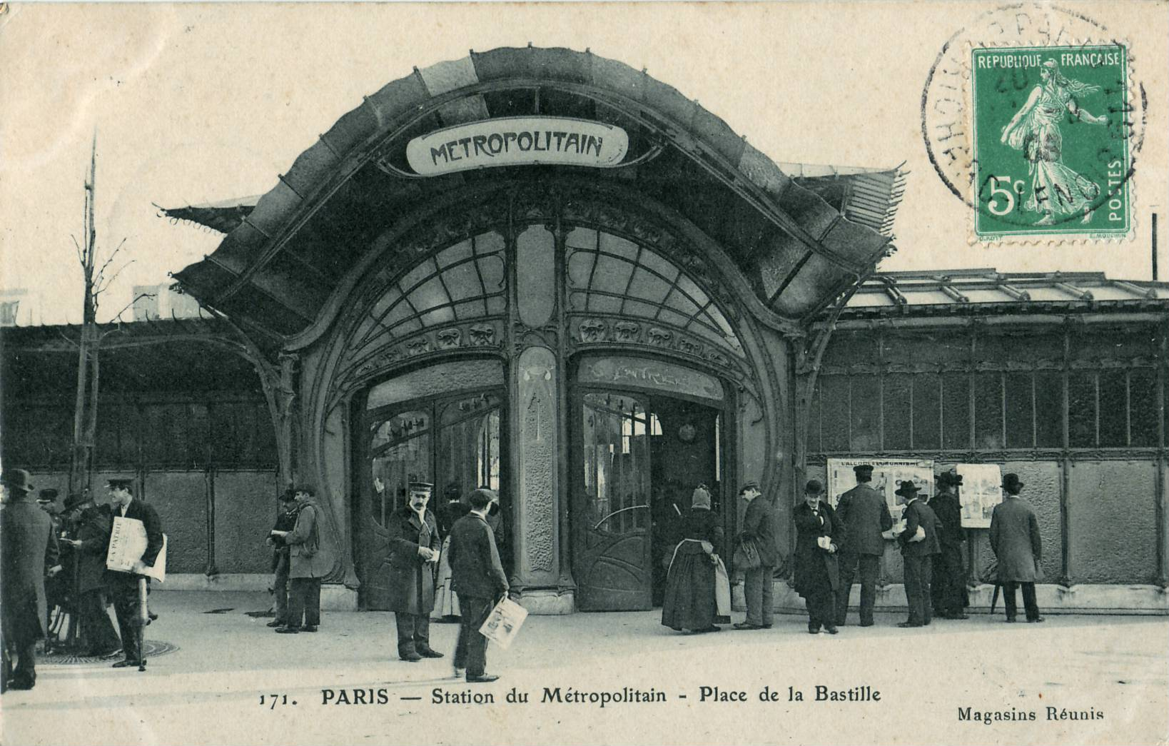 Carte postale ancienne éditée par les Magasins Réunis, n°171 : PARIS - Station du Métropolitain - Place de la Bastille